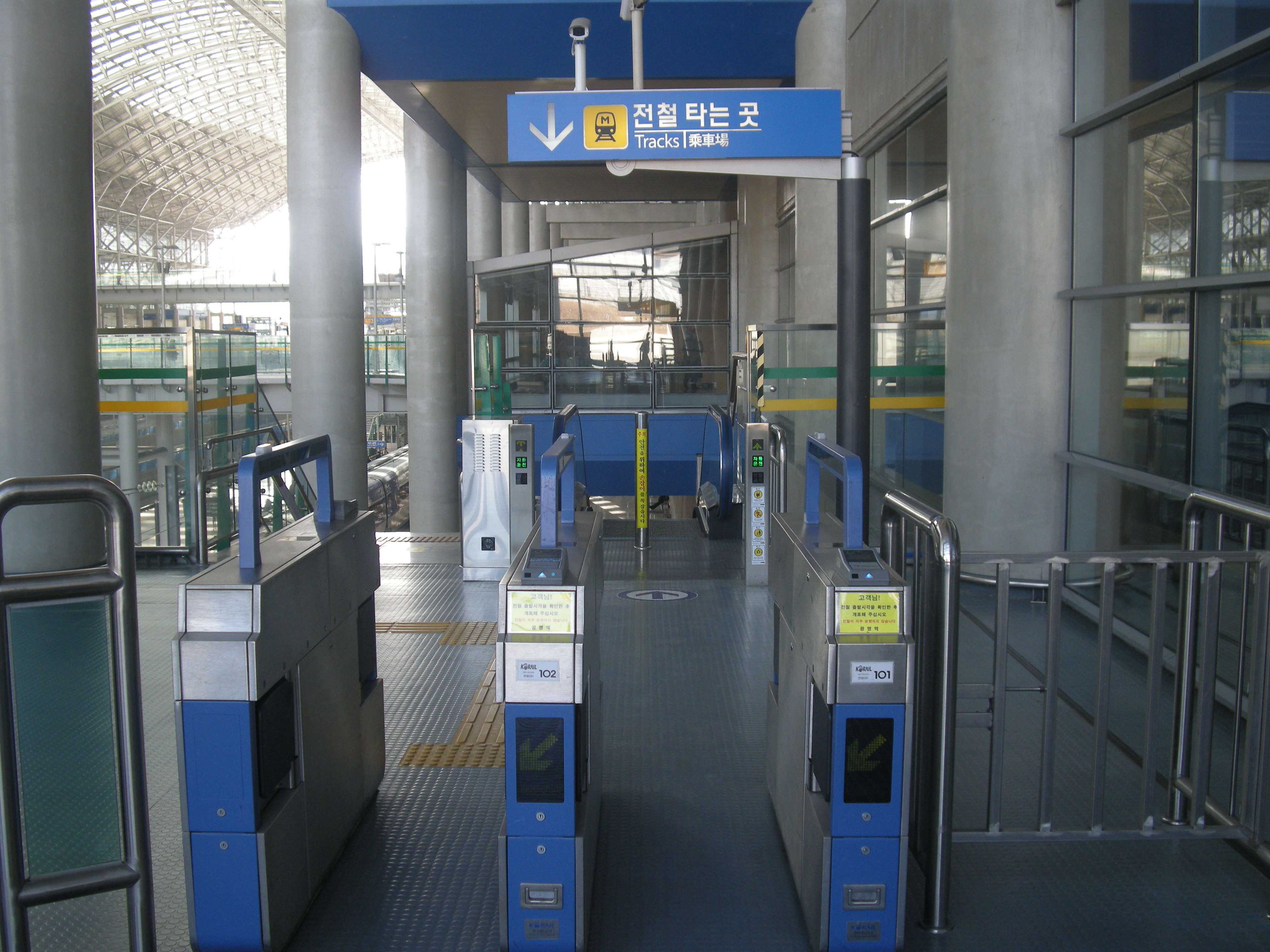 수도권 전철 1호선 광명역 승차 게이트